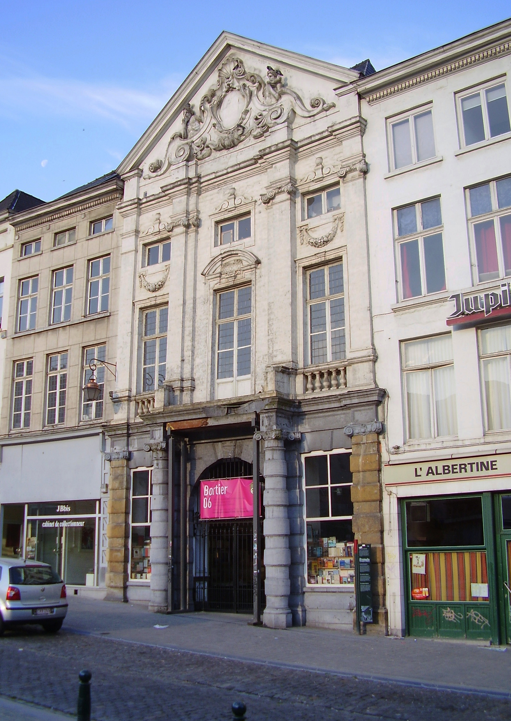 Galerie Bortier, rue de la Madeleine, Bruxelles (Belgique).